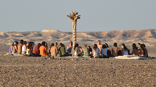 טוטם האשרם במדבר